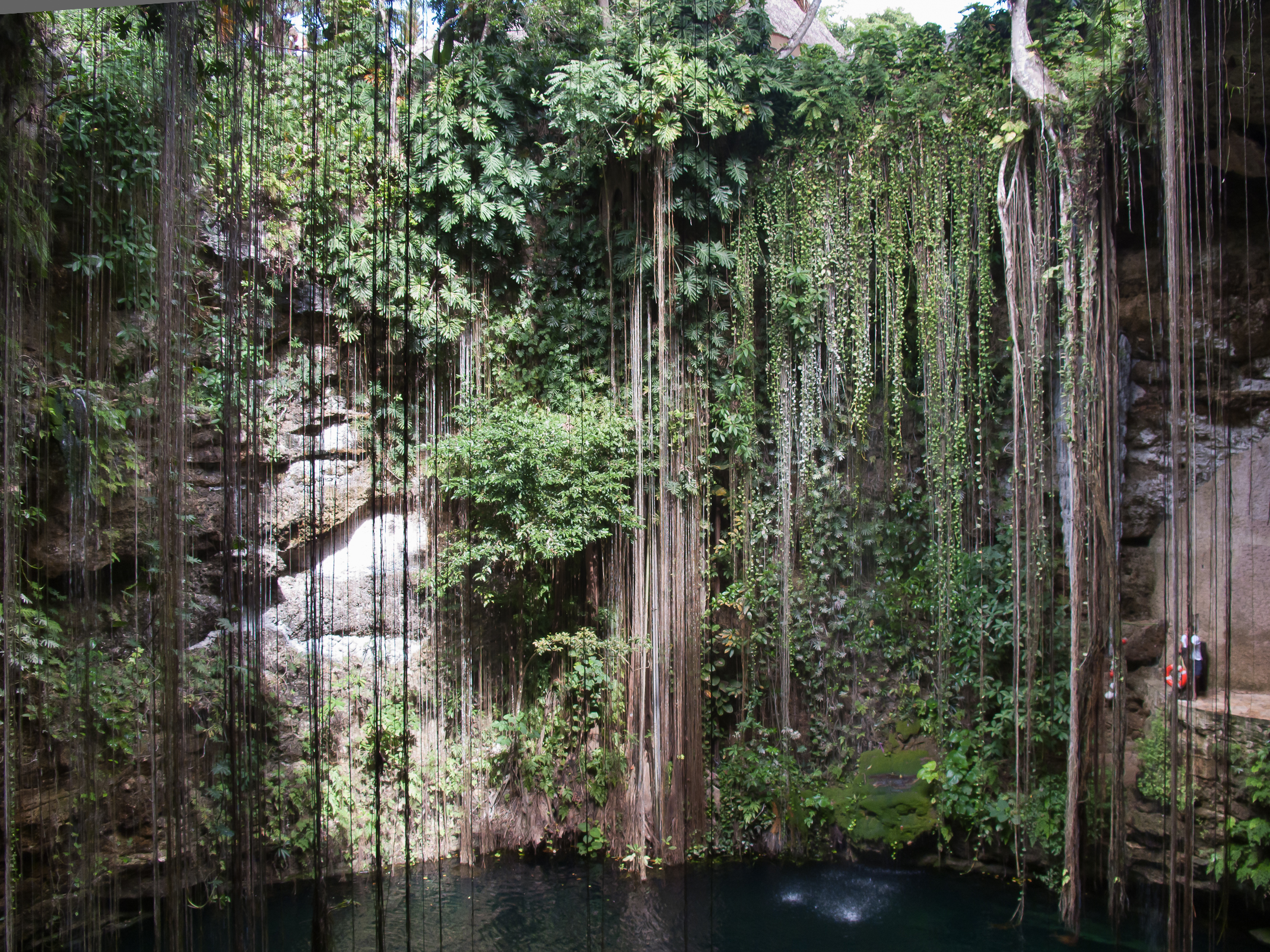 Vexetación nun cenote próximo a Chichén Itzá, México